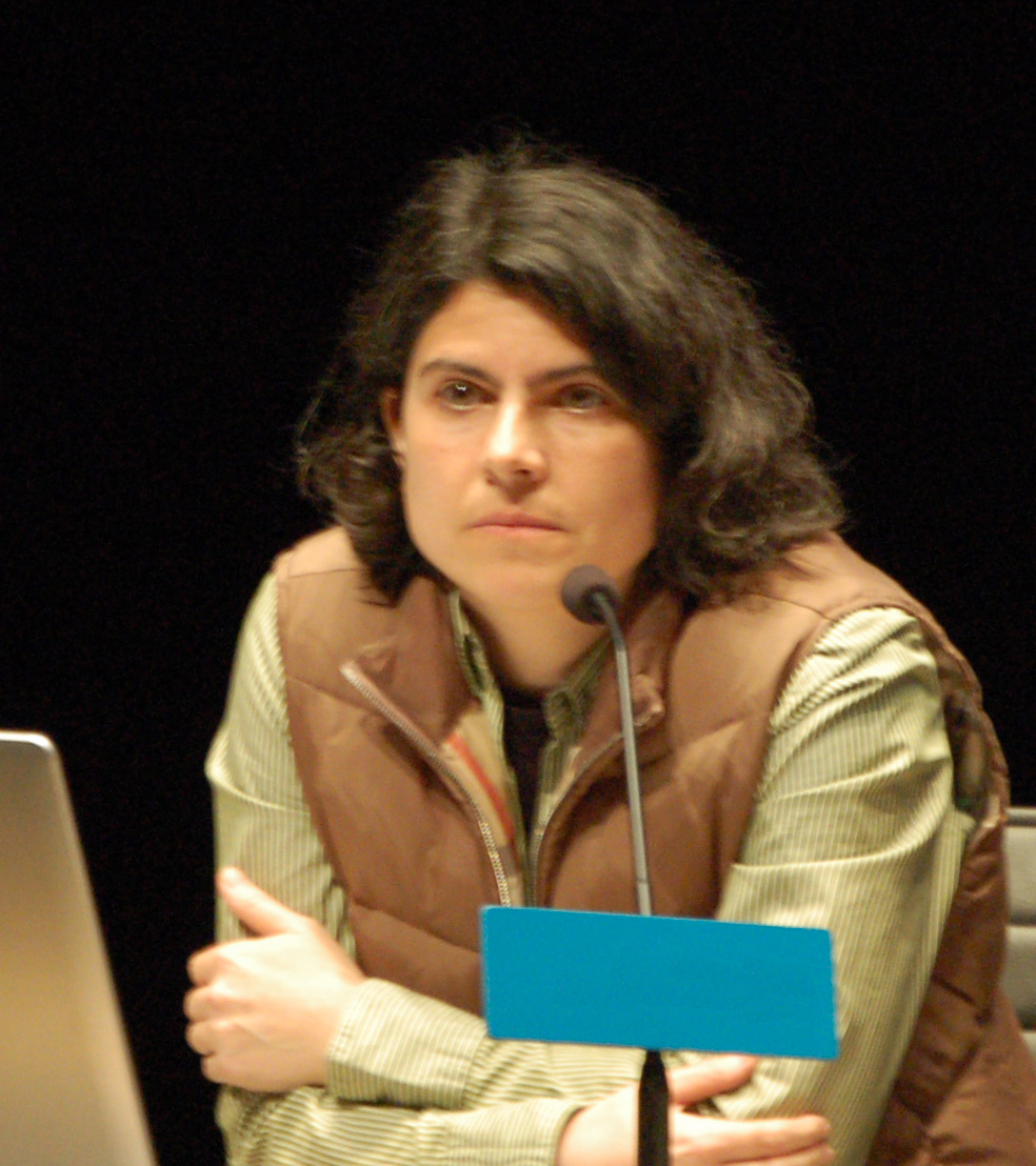 Coral del Río Otero na XXVII Semana Galega de Filosofía